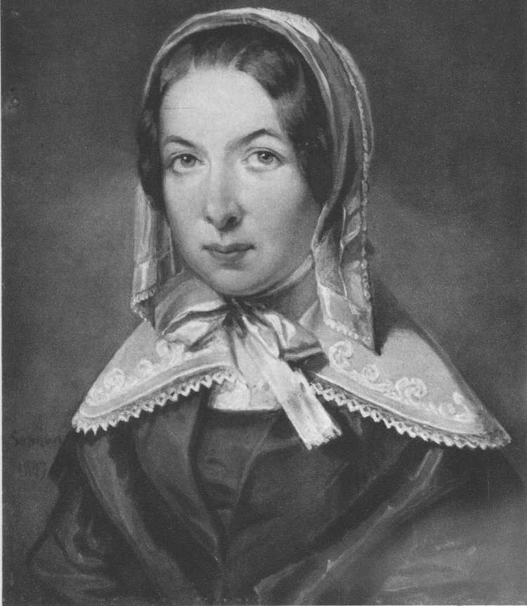 Fredrika Bremer (1801-1865)